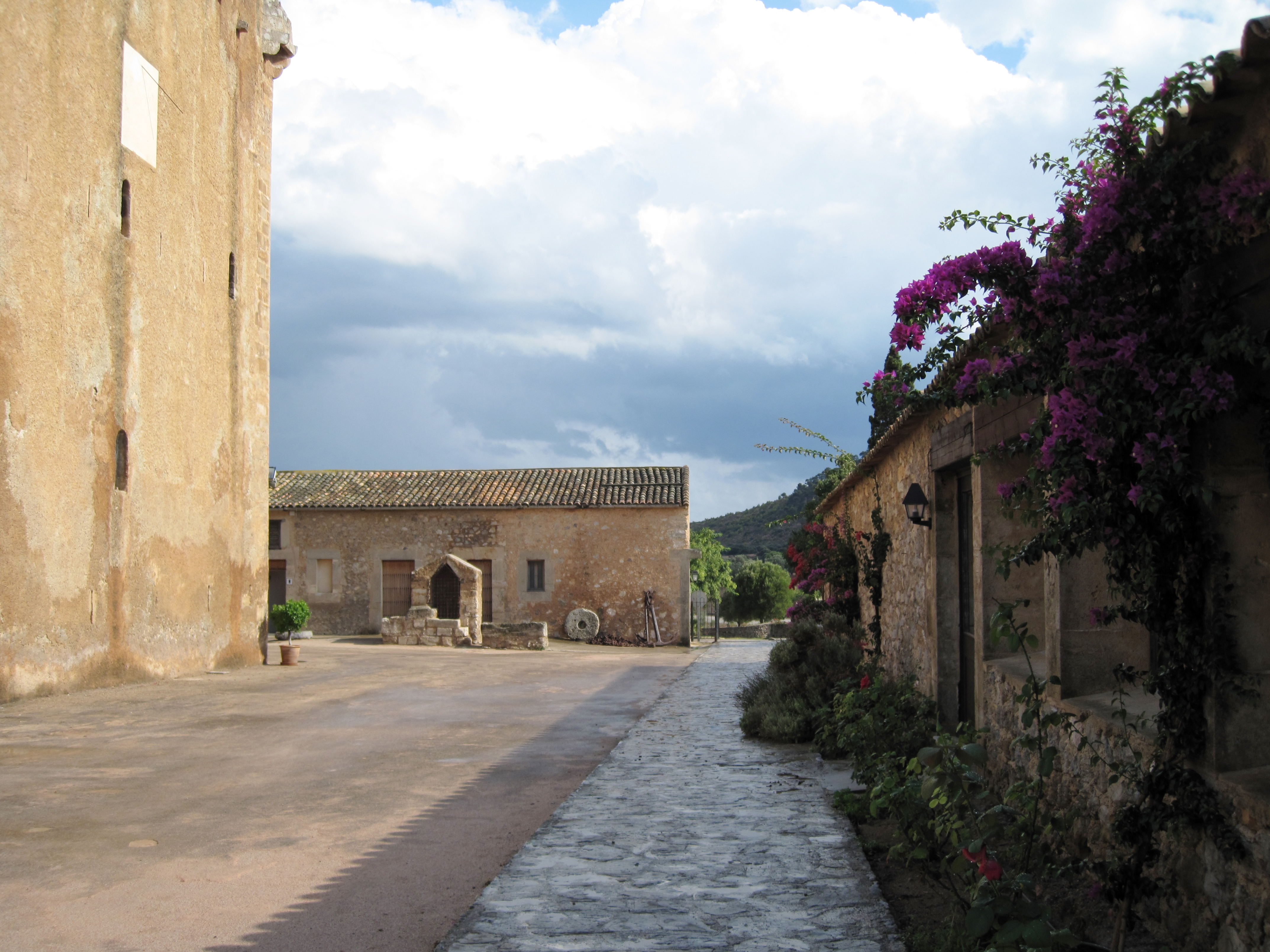 Hof am Turm von Canyamel (Torre de Canyamel), Gemeinde Capdepera, Mallorca, Spanien